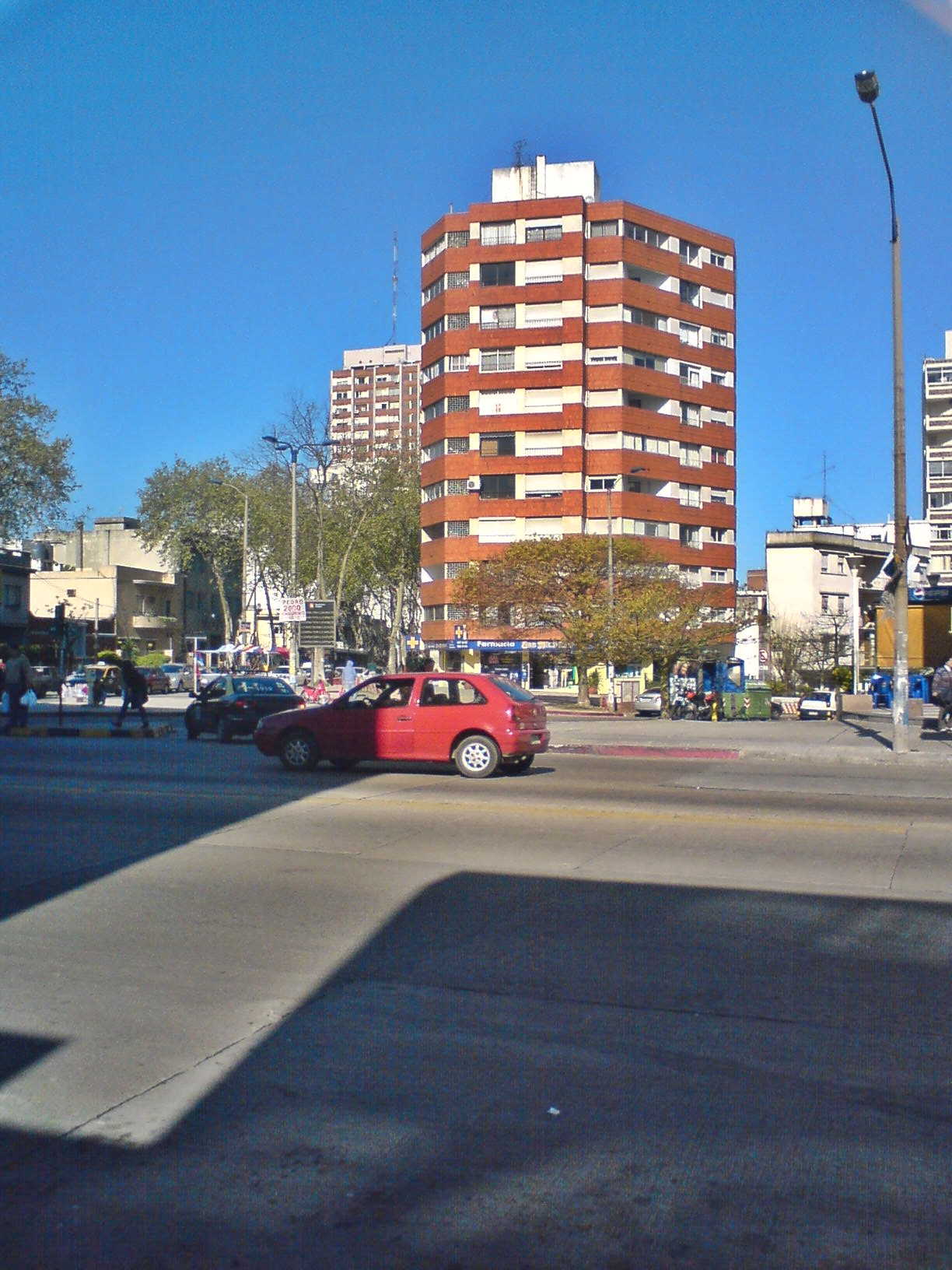 Av 8deOctubre en su cruce con Avenida Garibaldi, en el barrio de La Blanqueada.